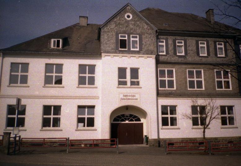 Winterberg (Hochsauerlandkreis) - Hauptschule